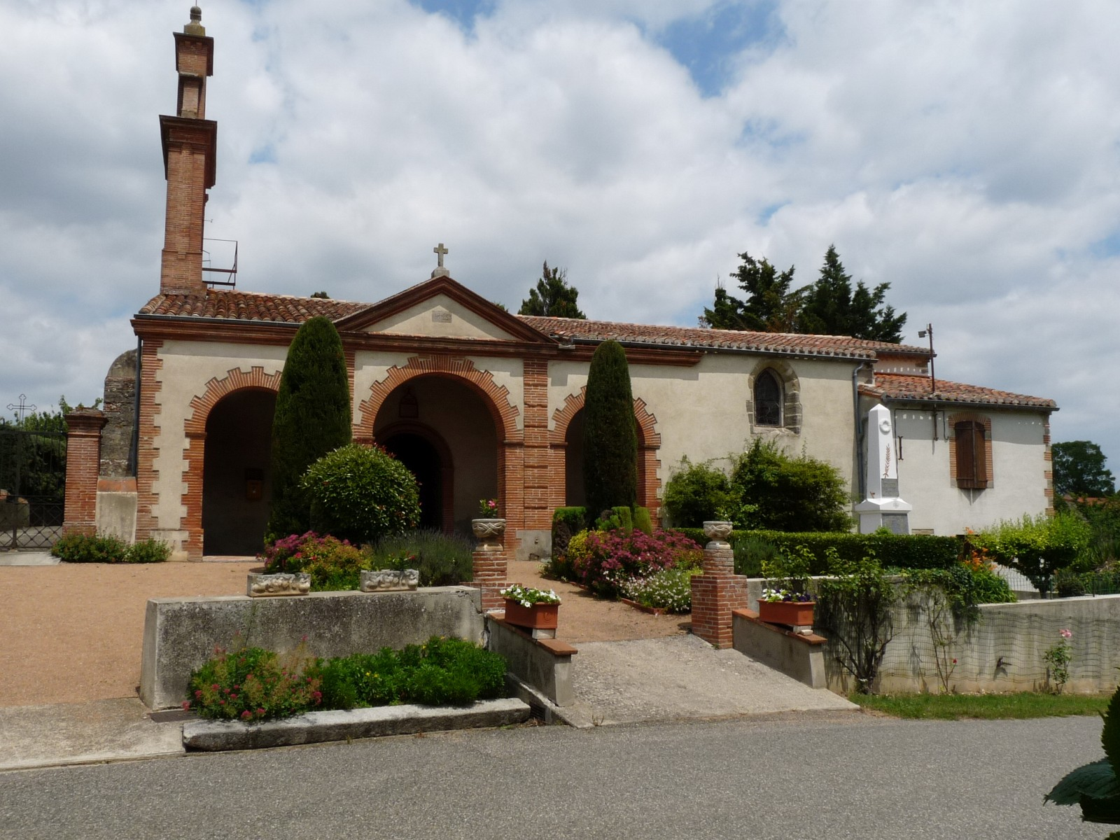 Eglise de Beauville, Haute-Garonne, France